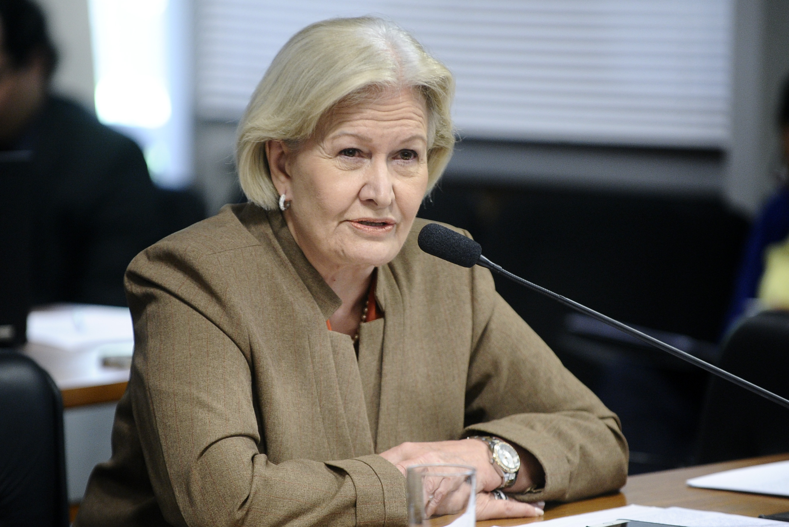 Comissão de Relações Exteriores e Defesa Nacional (CRE) realiza reunião deliberativa com 7 itens. Na pauta, leitura de indicações de embaixadores para Coreia e Granada, e PLS 398/2014, que dispõe sobre a lavra de minerais em faixa de fronteira. À bancada, senadora Ana Amélia (PP-RS). Foto: Marcos Oliveira/Agência Senado